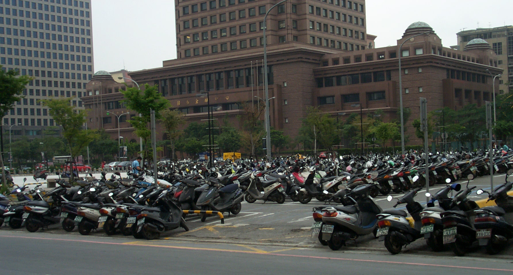 中文（台灣）: 國泰金融中心前停放的機車。